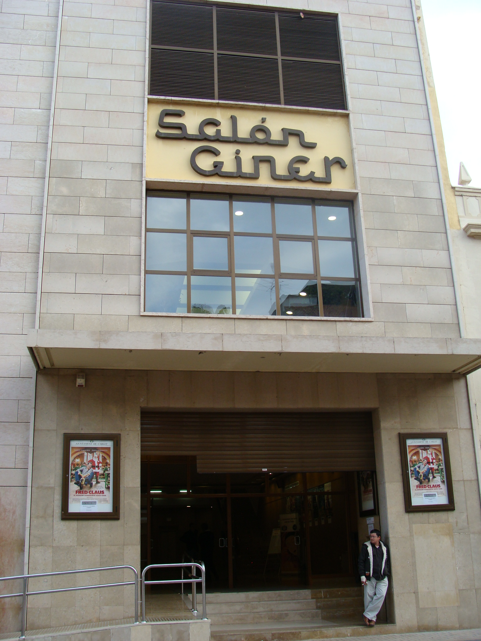 El Salón Giner, antigua sala de cine remozada recientemente, en Carlet, Valencia